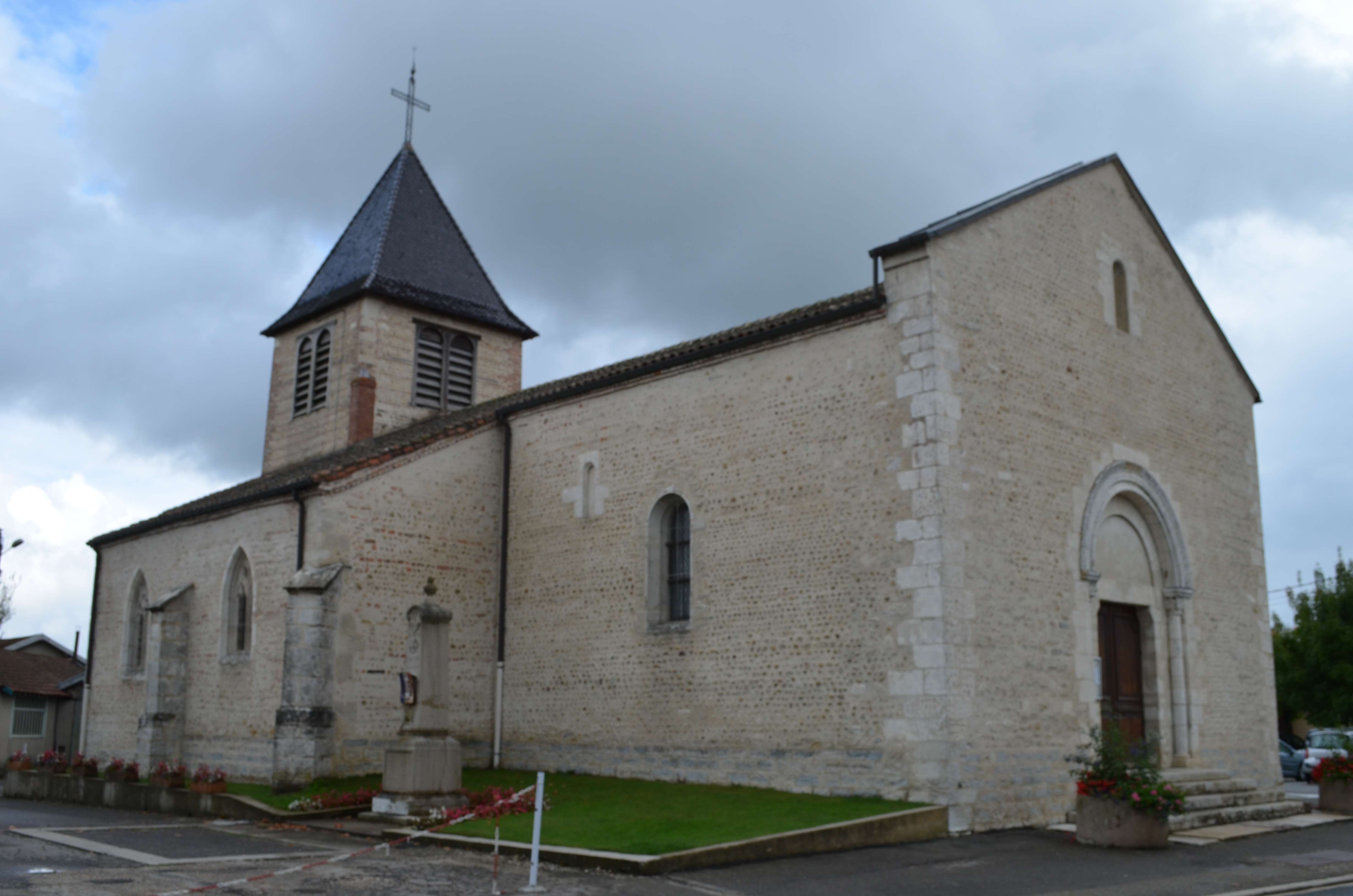 Église Saint-Nizier de Saint-Nizier-le-Désert. .